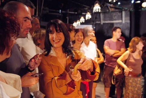 מתוך ההצגה "דודה פרידה: מוזיאון", מאת ובבימויה של נעמי יואלי